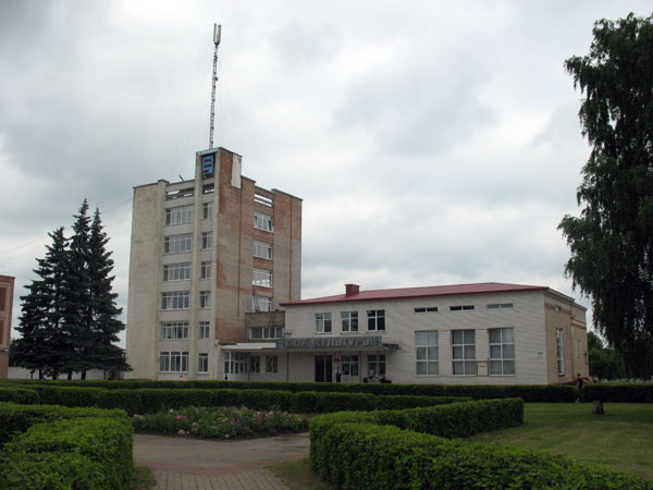 Сноў. Цэнтральная плошча